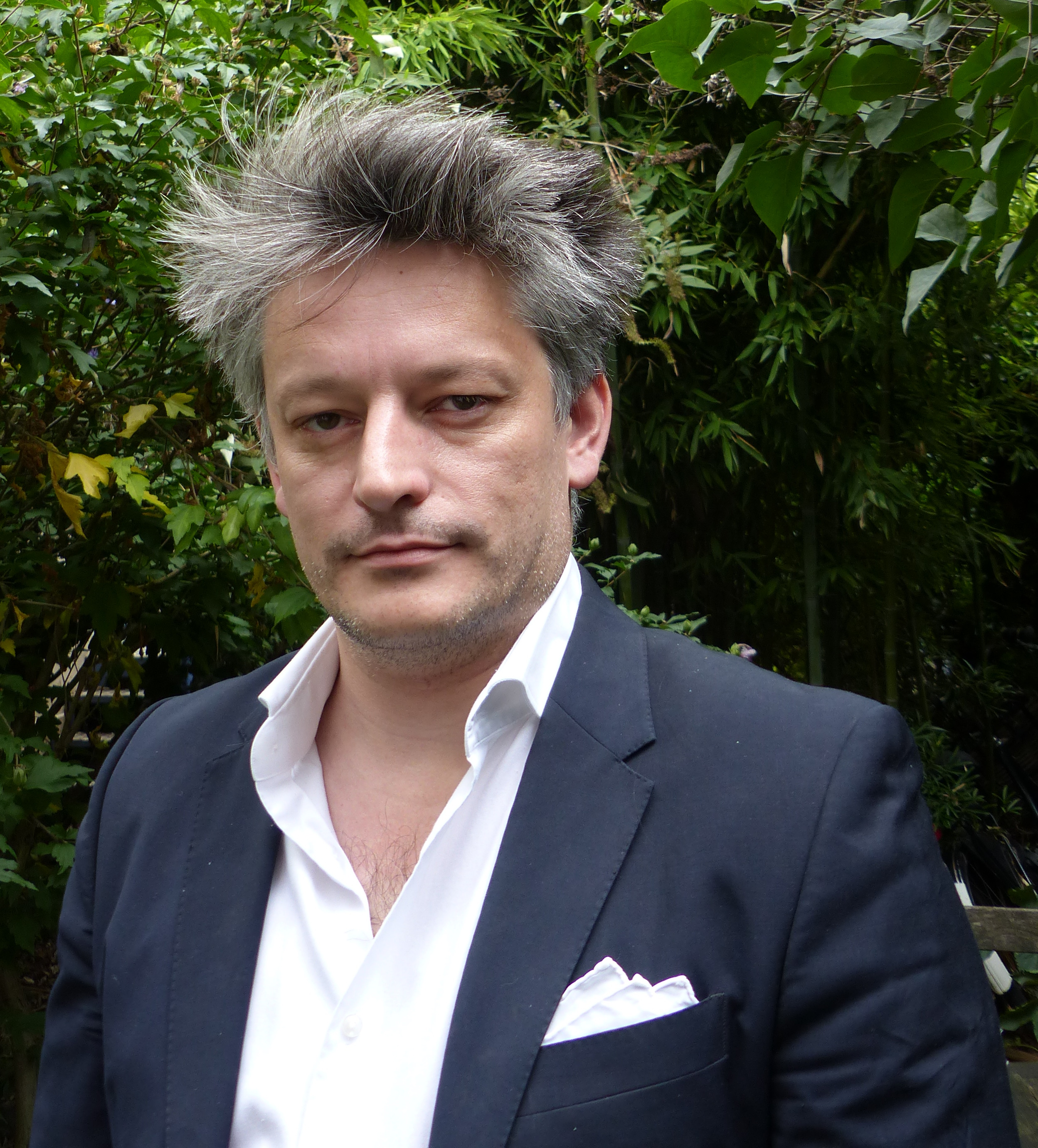 Hugo Horiot, auteur de L'empereur, c'est moi et de Autisme : j'accuse !